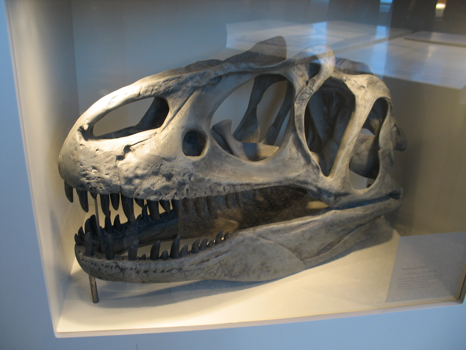 Head of an Allosaura at the Museum voor Natuurwetenschappen in Brussels, Belgium